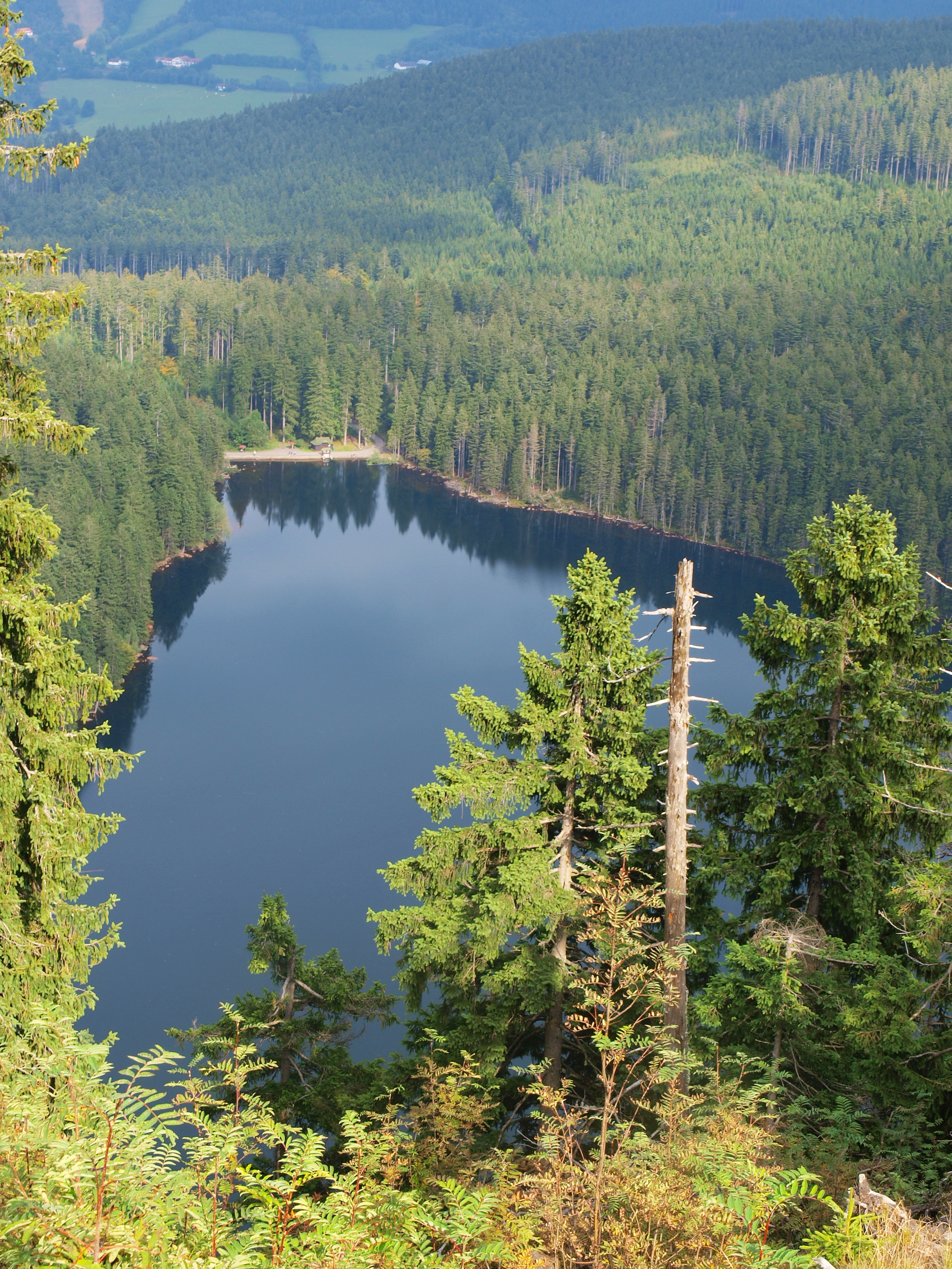 Černé jezero zabírané z karové stěny pod Jezerní horou poblíž Svarohu